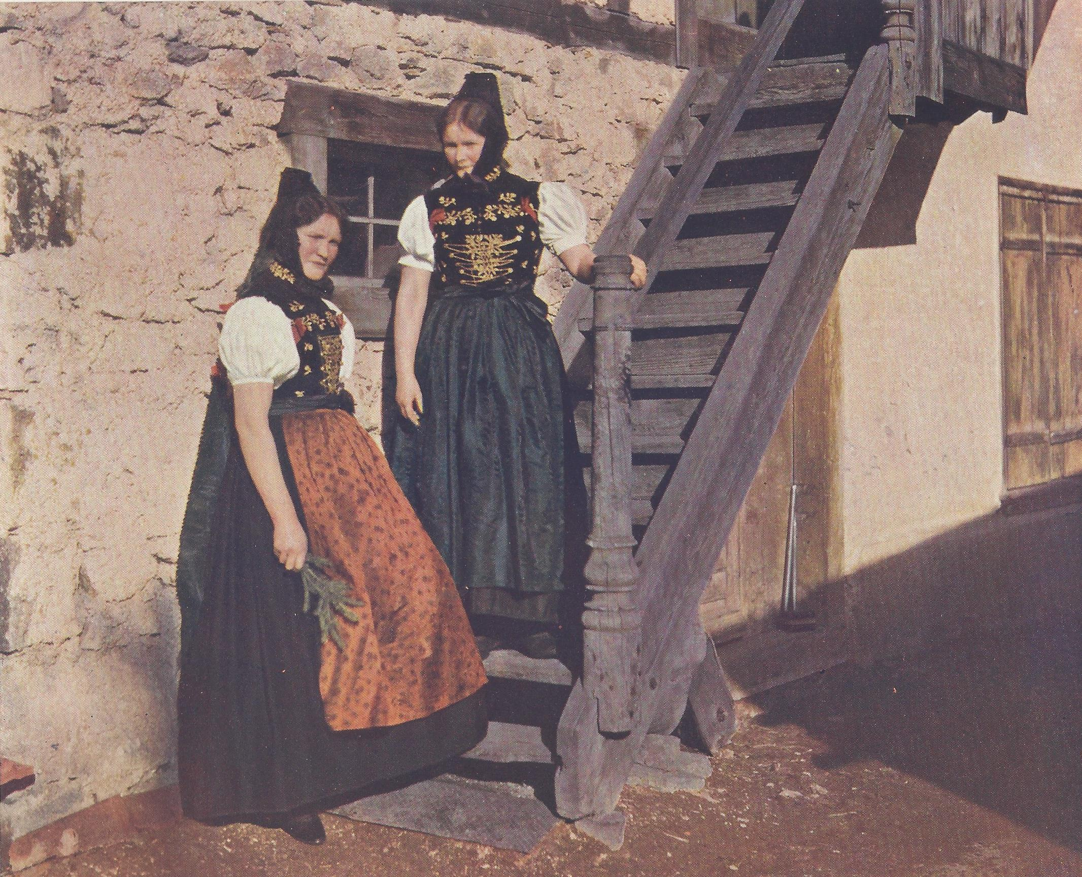 Farbfotografie nach den Autochromverfahren aus: Der Schwarzwald in Farbenphothographien, Wagner Freiburg 1910-1911, Tafel Nr. 24: Neustädter Tracht